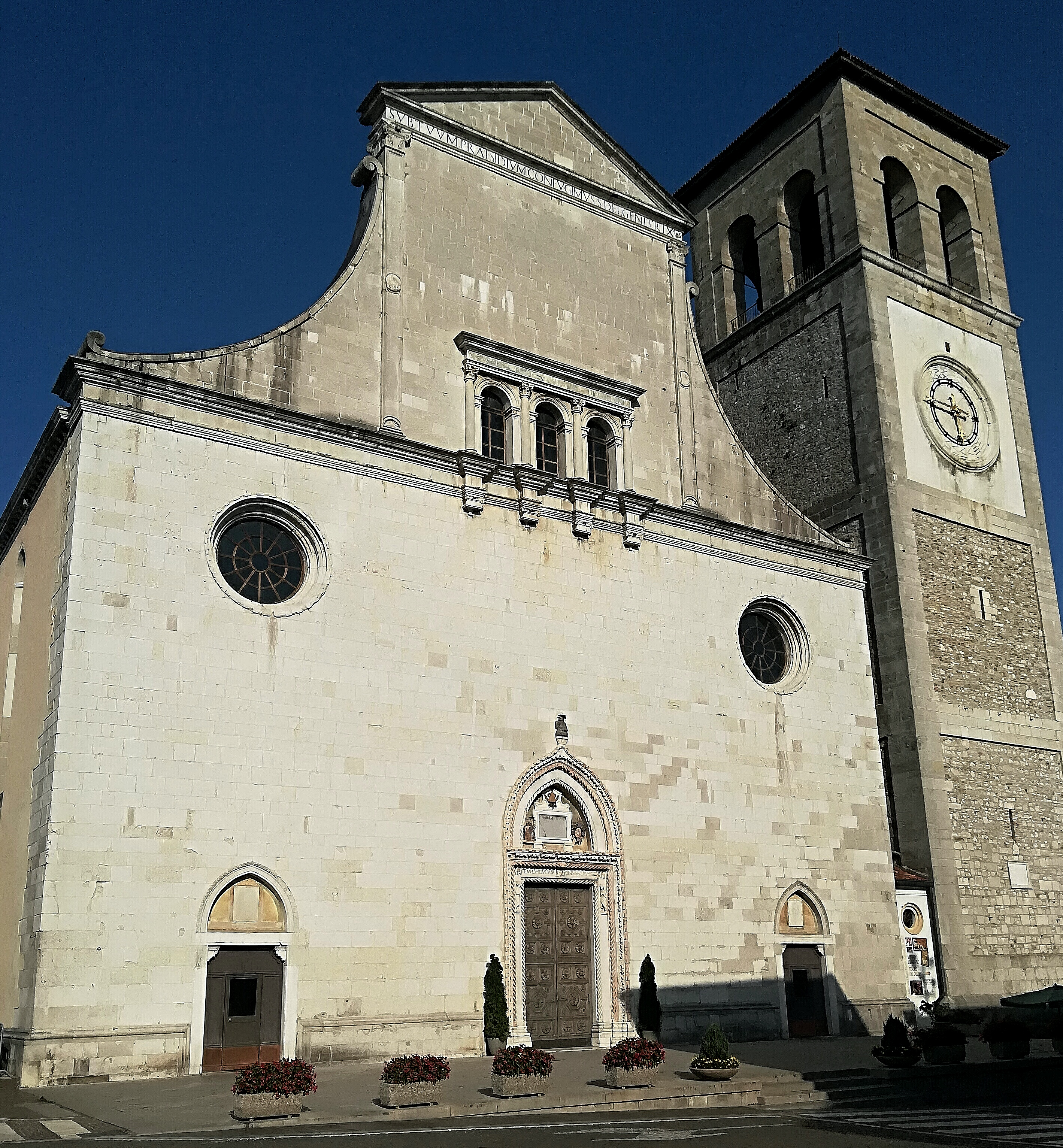 Il Duomo di Cividale del Friuli, dedicato a Santa Maria Assunta e costruito nel XVI secolo, dopo che, a causa del cedimento di una colonna, era crollato il precedente Duomo.